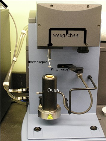 TGA instrument eigen foto